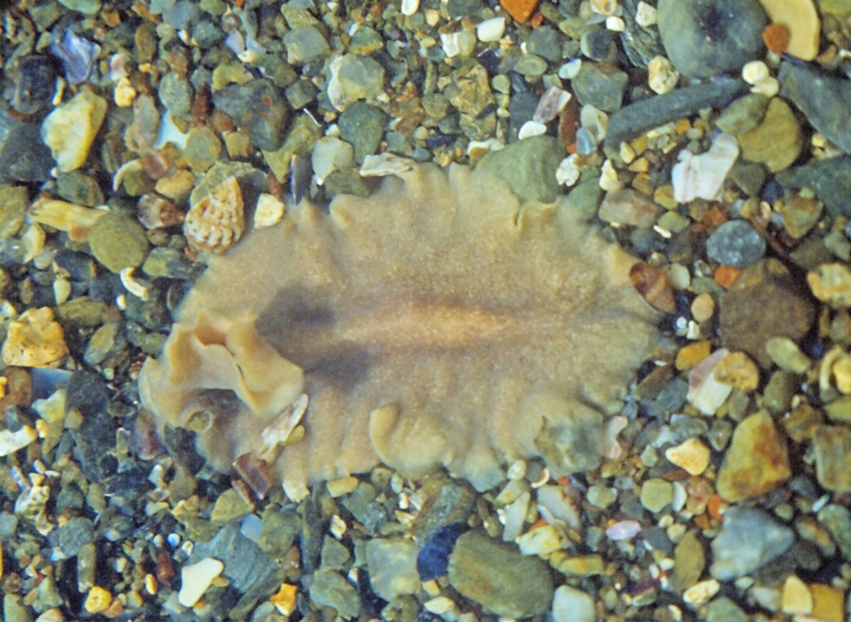 Stylochus pilidium